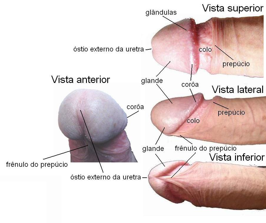 Partes anatômicas externas da parte livre de um Pênis